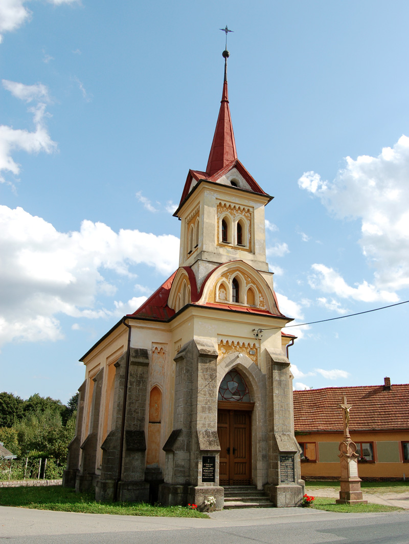 Zbraslavec - kaple zasvěcená Sv. panně Marii karelské